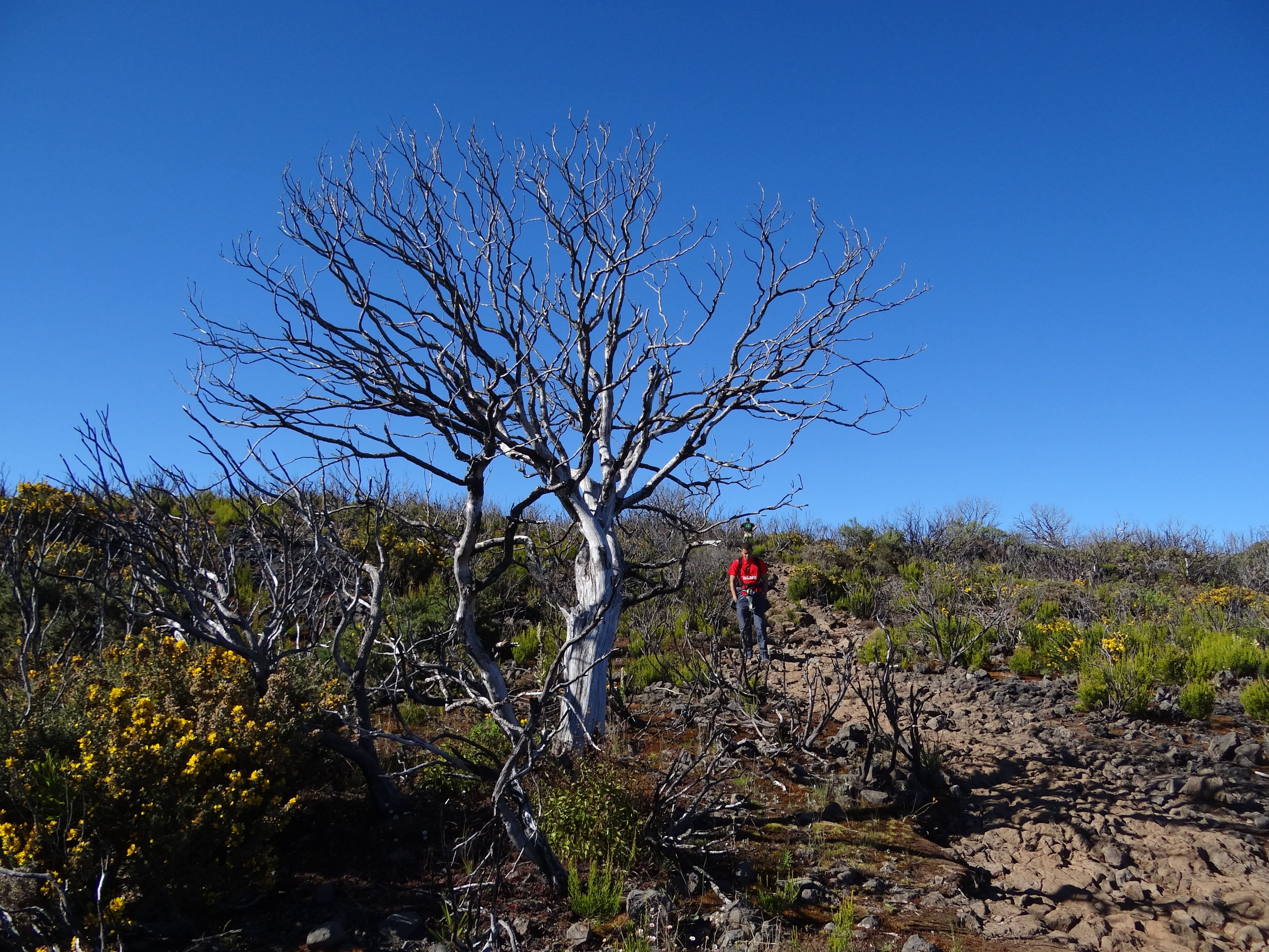 Malgré la folie meurtrière des hommes pyromanes la nature parvient à nous émerveiller.